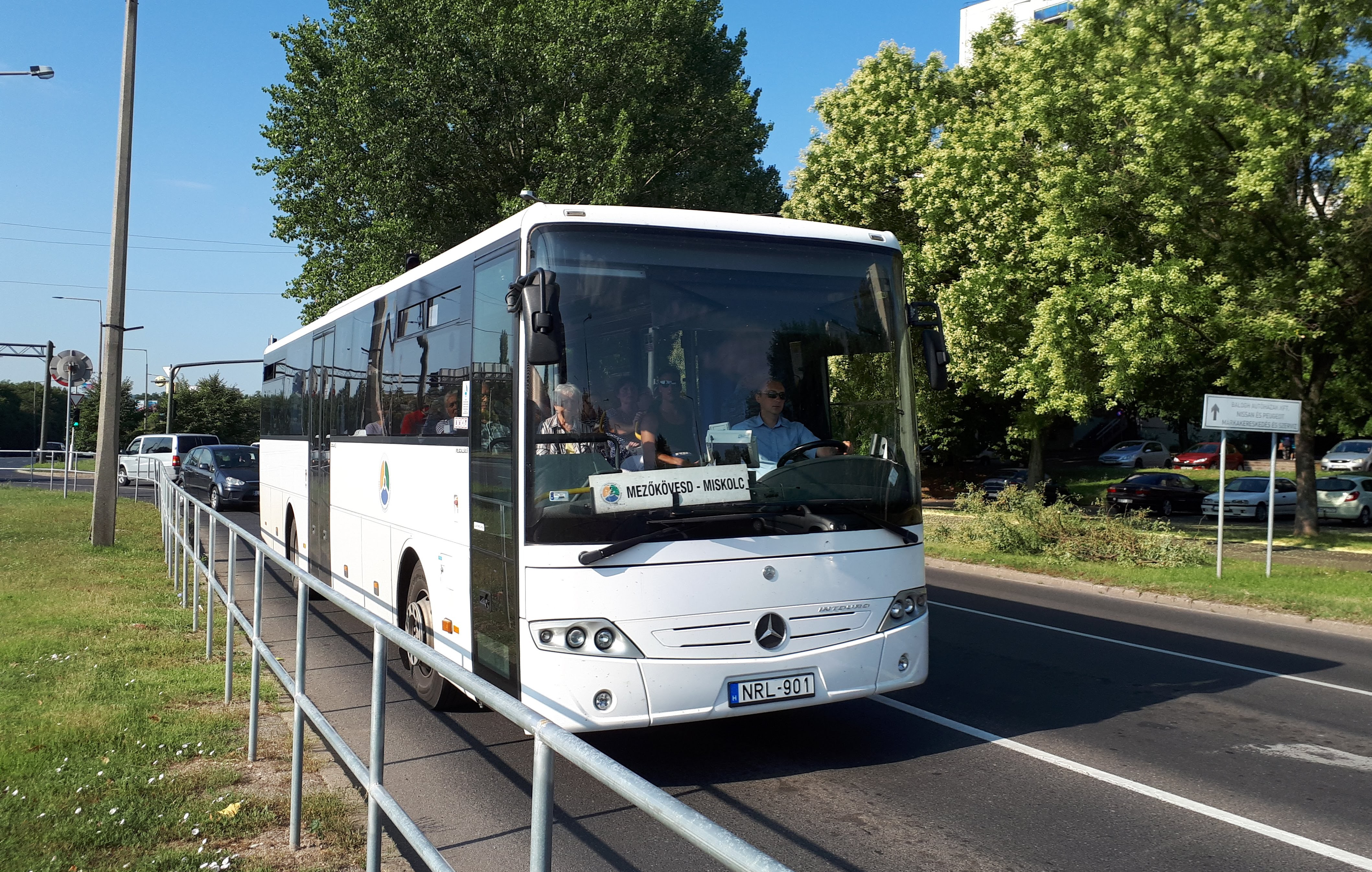 Az ÉMKK NRL-901 rendszámú Mercedes Intouro busza Miskolcon, a 3749-es helyközi járaton.